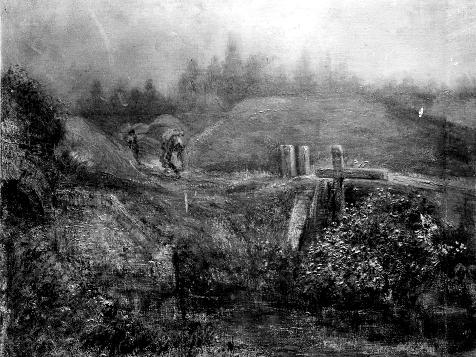 Bonnefantenmuseum: sluis bij Tongerse Poort, in 1868 afgebroken.